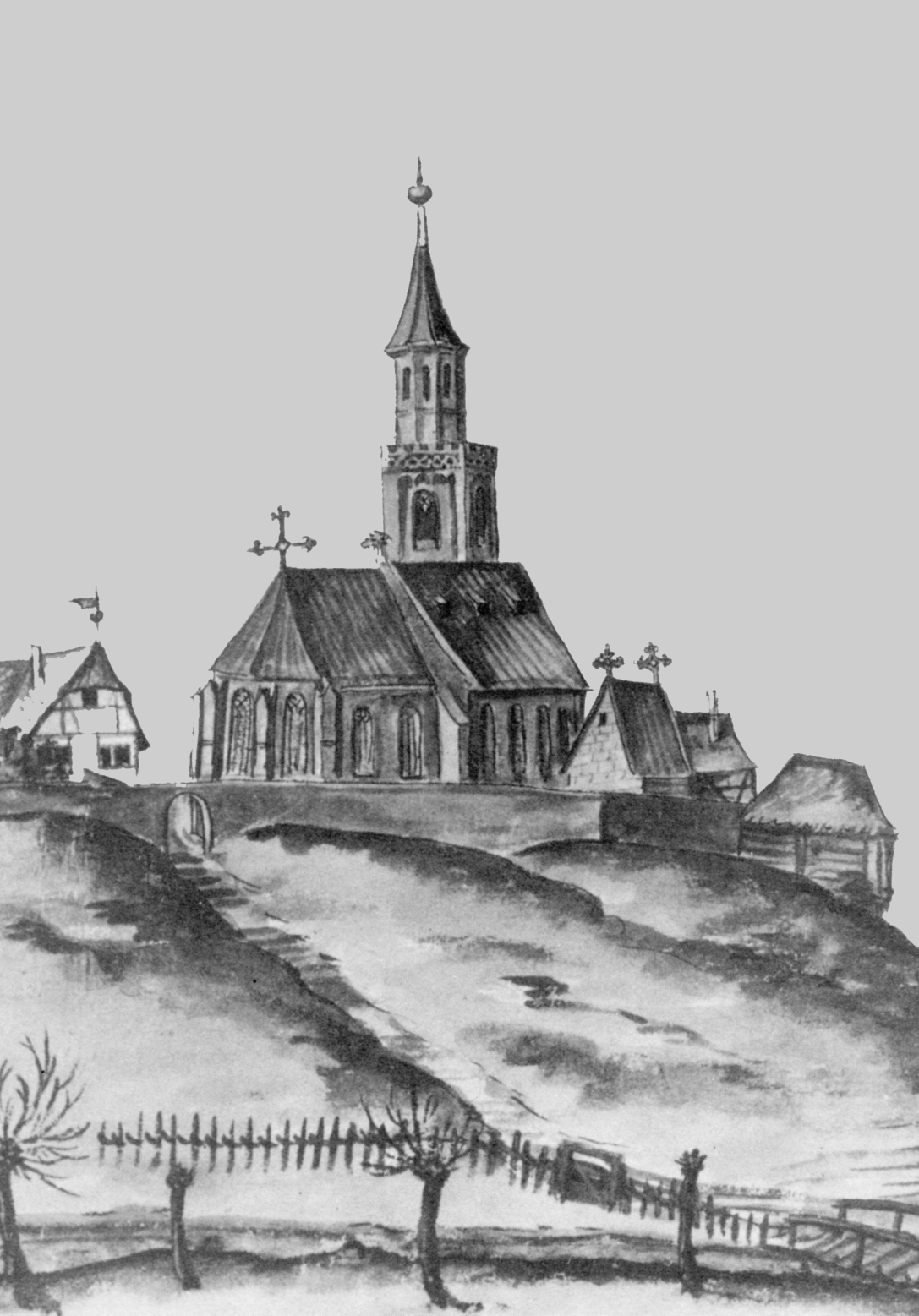 Kirche St. Michael (Fürth) im Stiftungsbuch von Benedikt Köler, Postkarte (Rückseite ohne Beschriftung). Ausschnitt, Hintergrund mit Bildbearbeitung nivelliert. Im Original farbiges Aquarell (siehe hier), die Veröffentlichtung wird auf "ca. 1614" datiert (siehe dort)